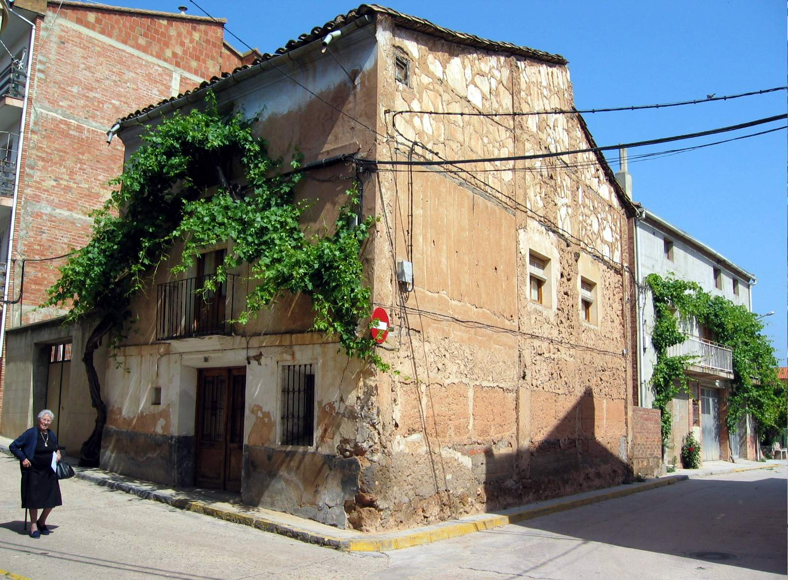 Detalle de construcción tradicional (vernacular) en Torrebaja (Valencia), calle de san Roque.